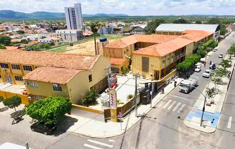 Serra-Talhada-Aeset